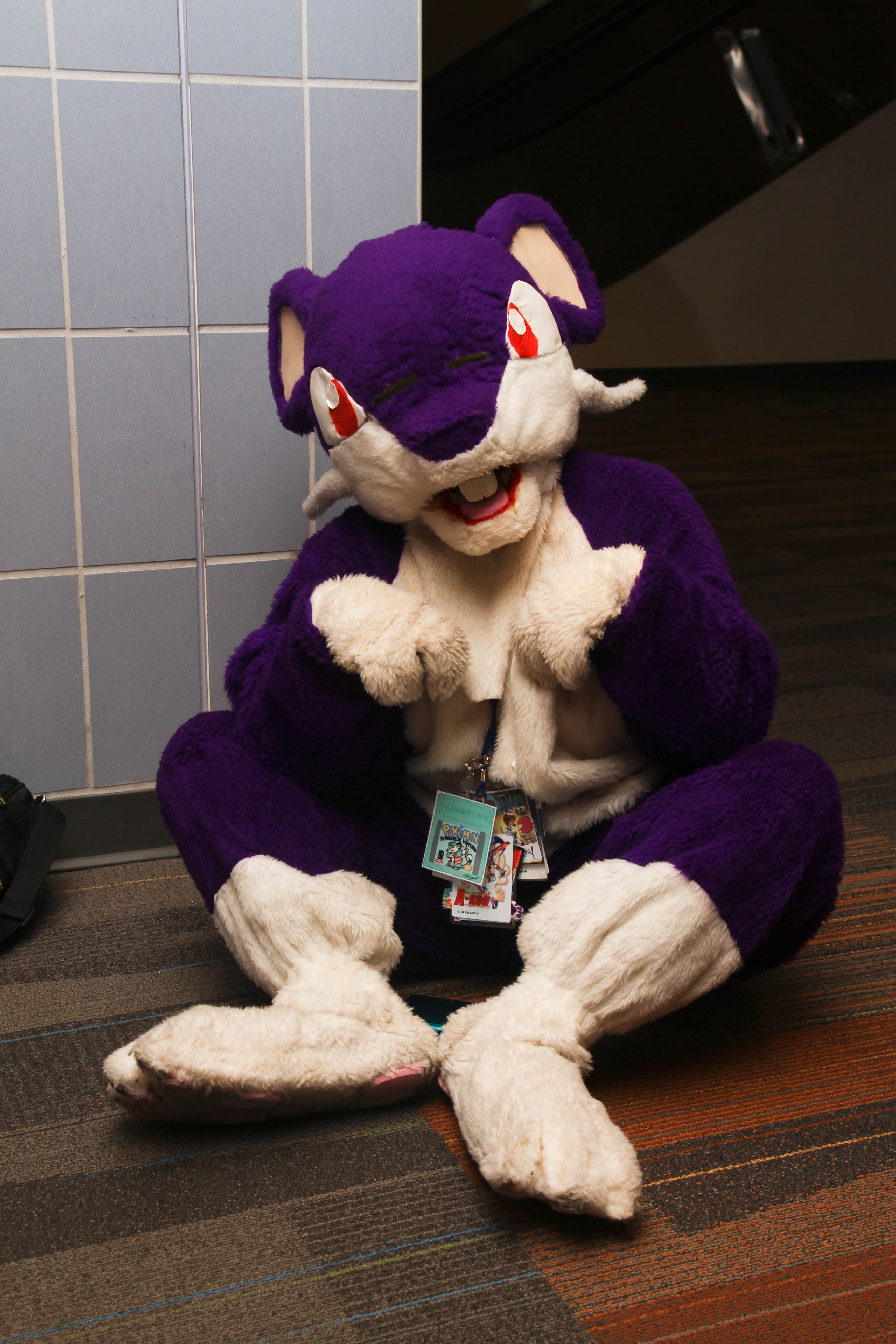 Costume de Rattata.